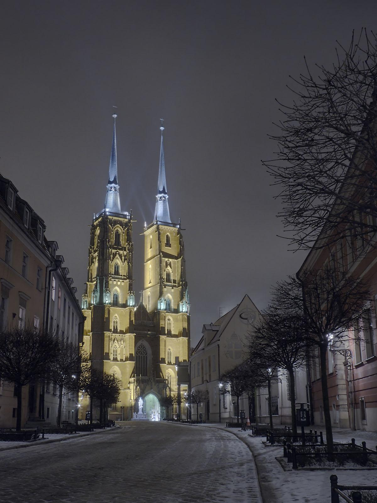 Katedra p.w. św. Jana Chrzciciela, wieczorem